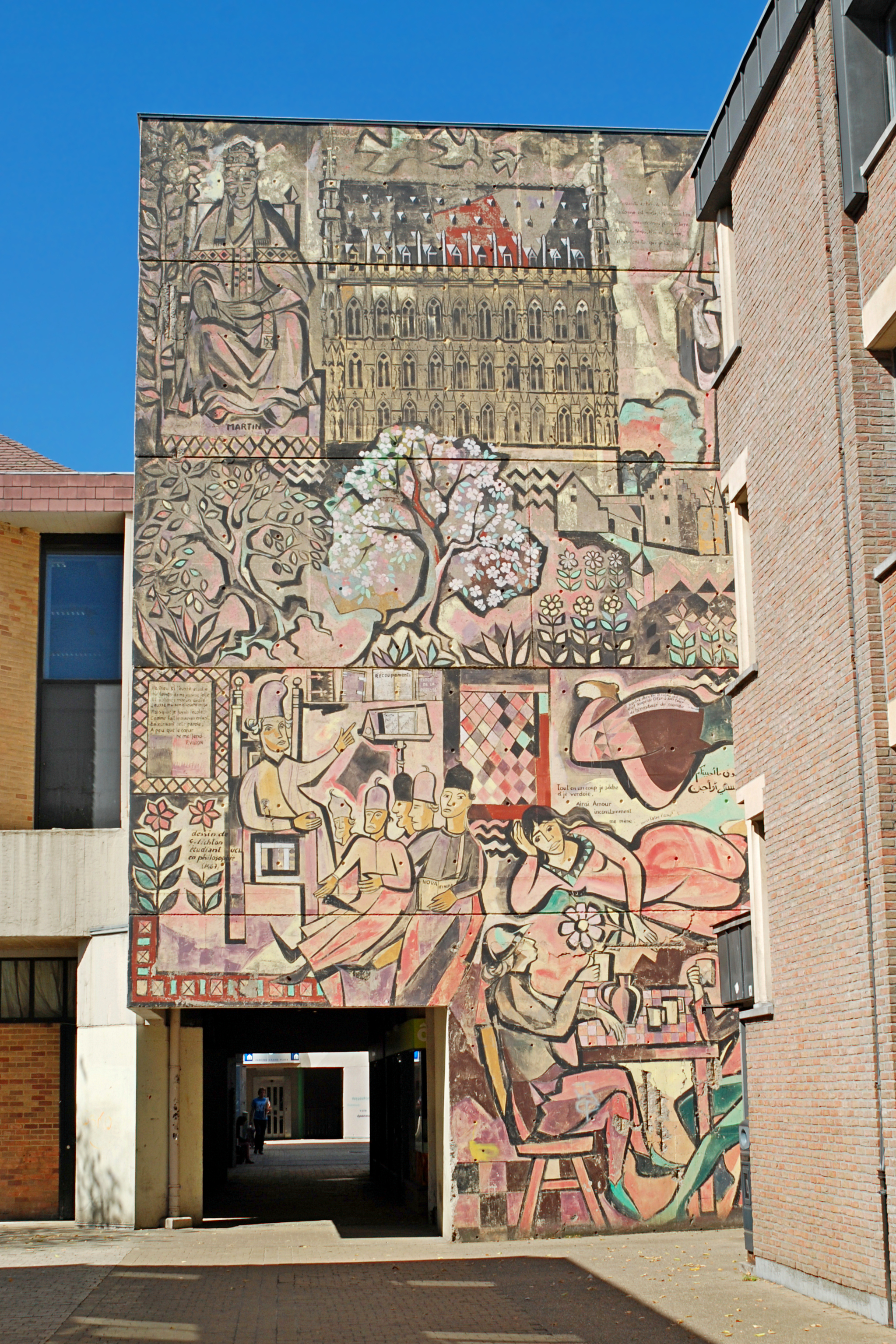 Belgique - Louvain-la-Neuve - Rue de la Lanterne magique - Fresque "Petites histoires d'une grande université" (Claude Rahir 1984) This photo of immovable heritage has been taken in the Walloon Region